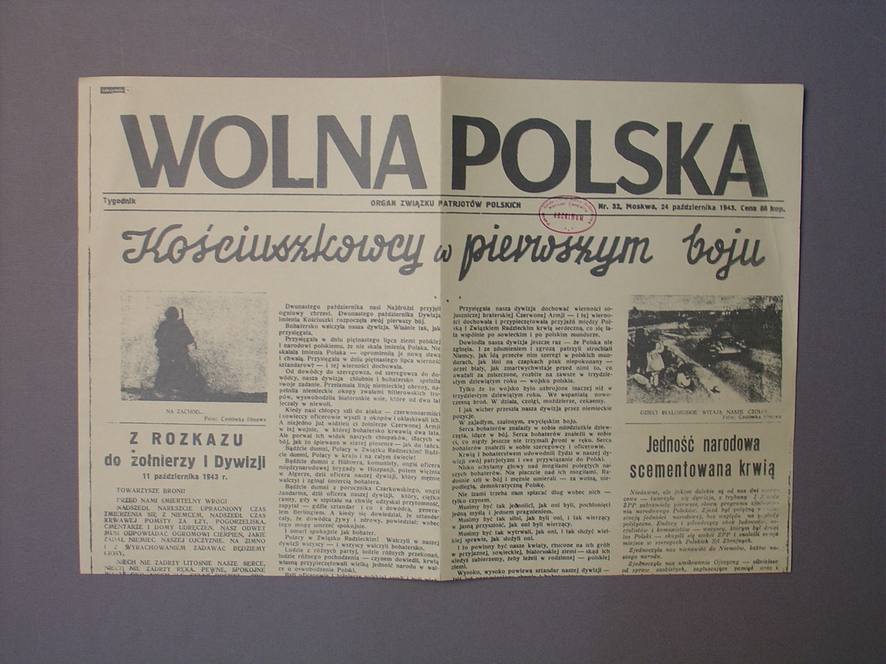 Prasa z okresu Powstania Warszawskiego